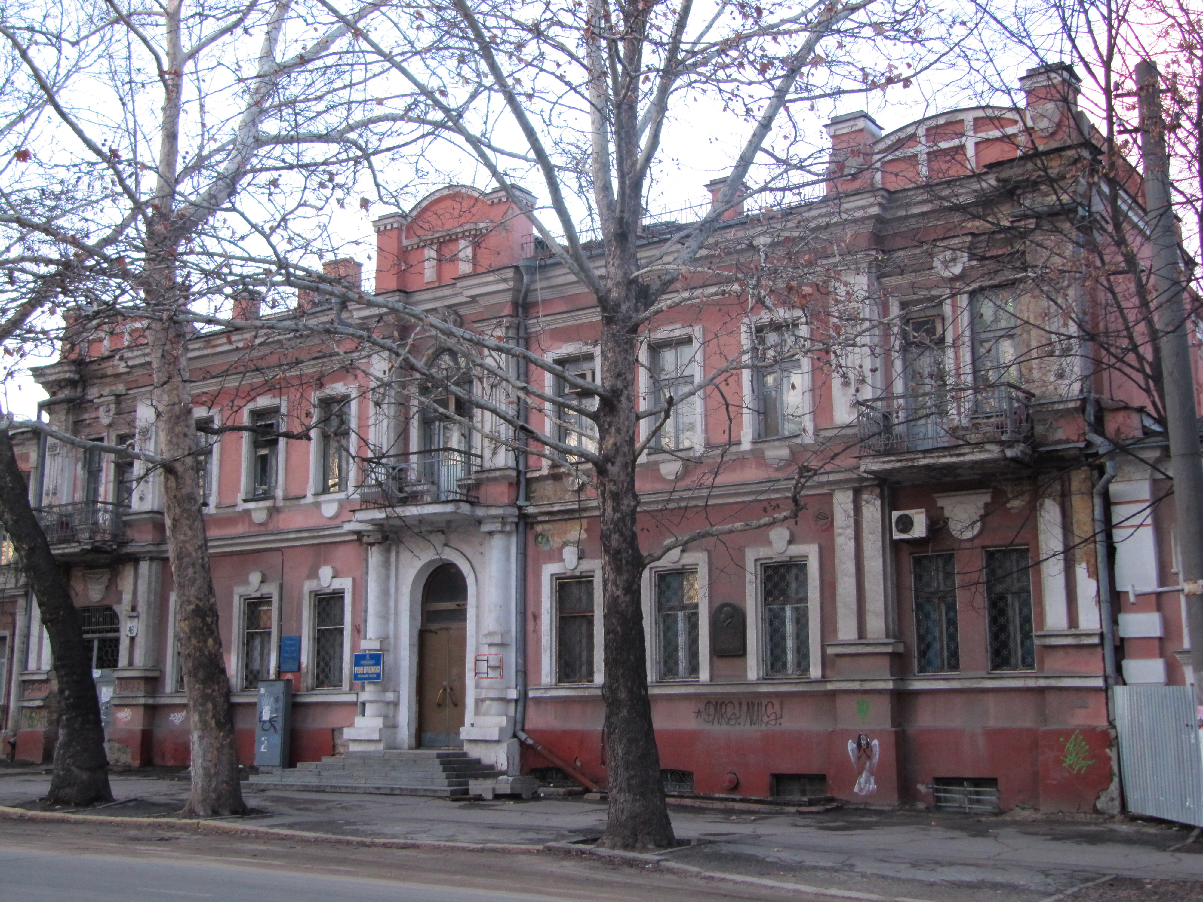 Будинок редакції газети "Рідне Прибужжя", м. Миколаїв Миколаївська весна у Вікіпедії